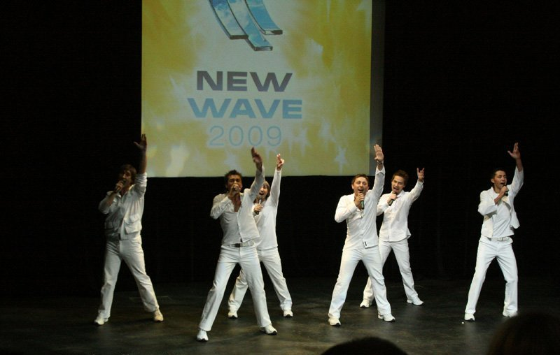 Группа DukeTime принимала участие в отборочных прослушиваниях на вокальный конкурс "Новая волна-2009"